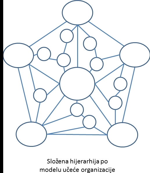 Složena hijerarhija po modelu učeće organizacije - shema